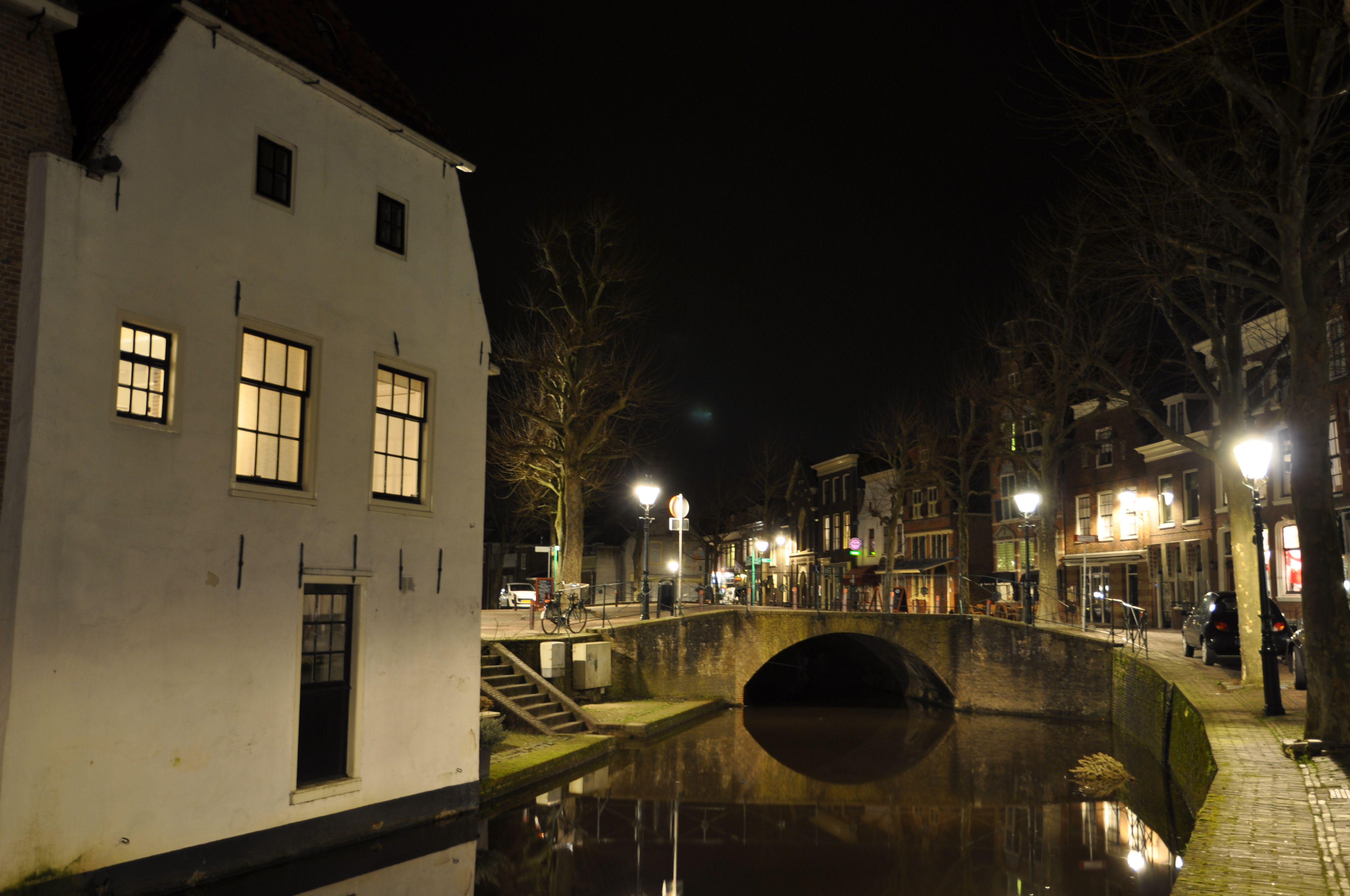 Nacht in Oudewater.